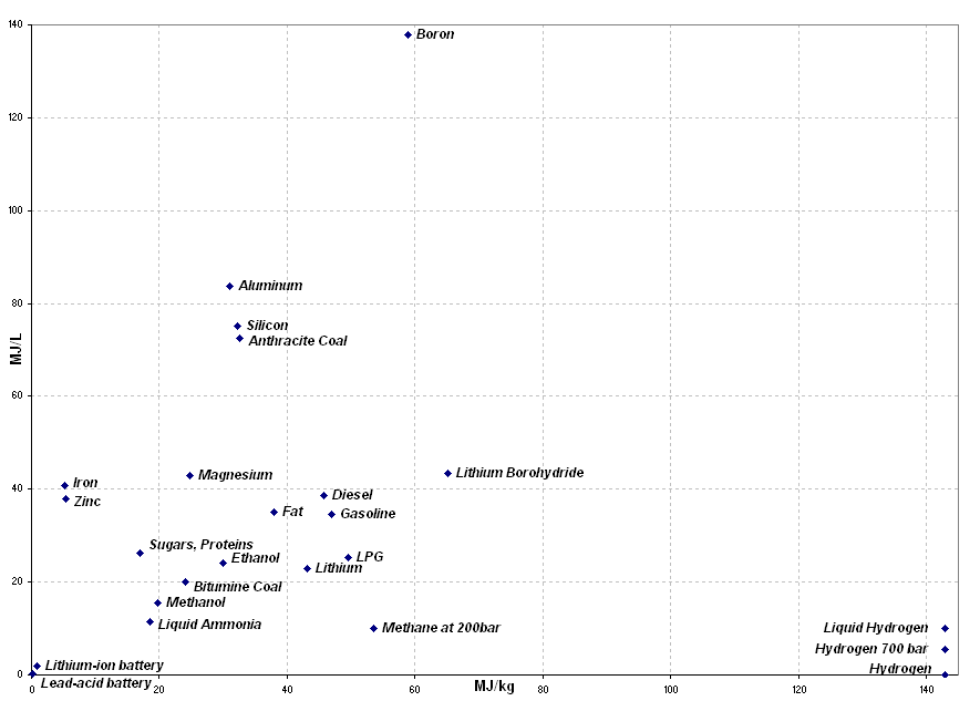 Energy densities